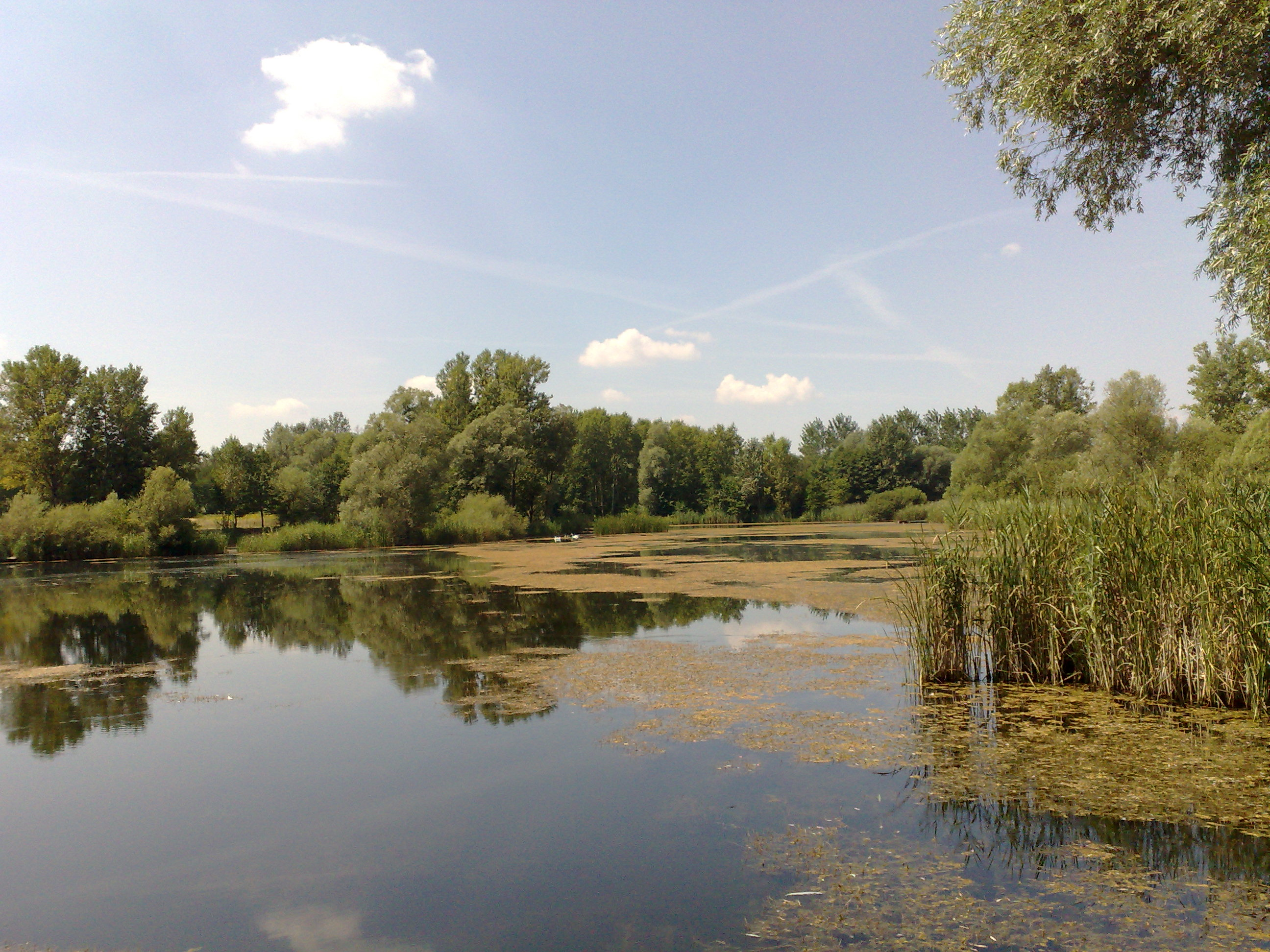 18.08.2012. _ Petišovci, Lendava, Slovenija